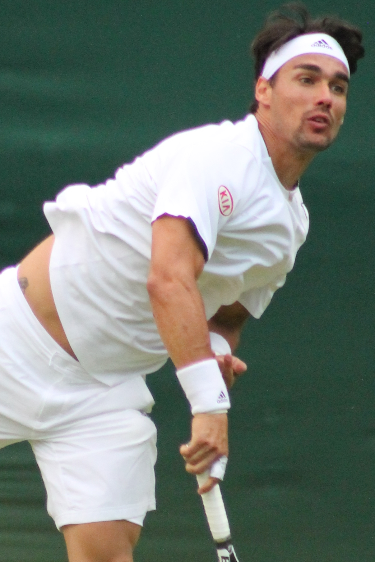 Fognini WM14 (2)